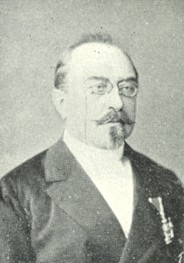 Wendelin Rziha